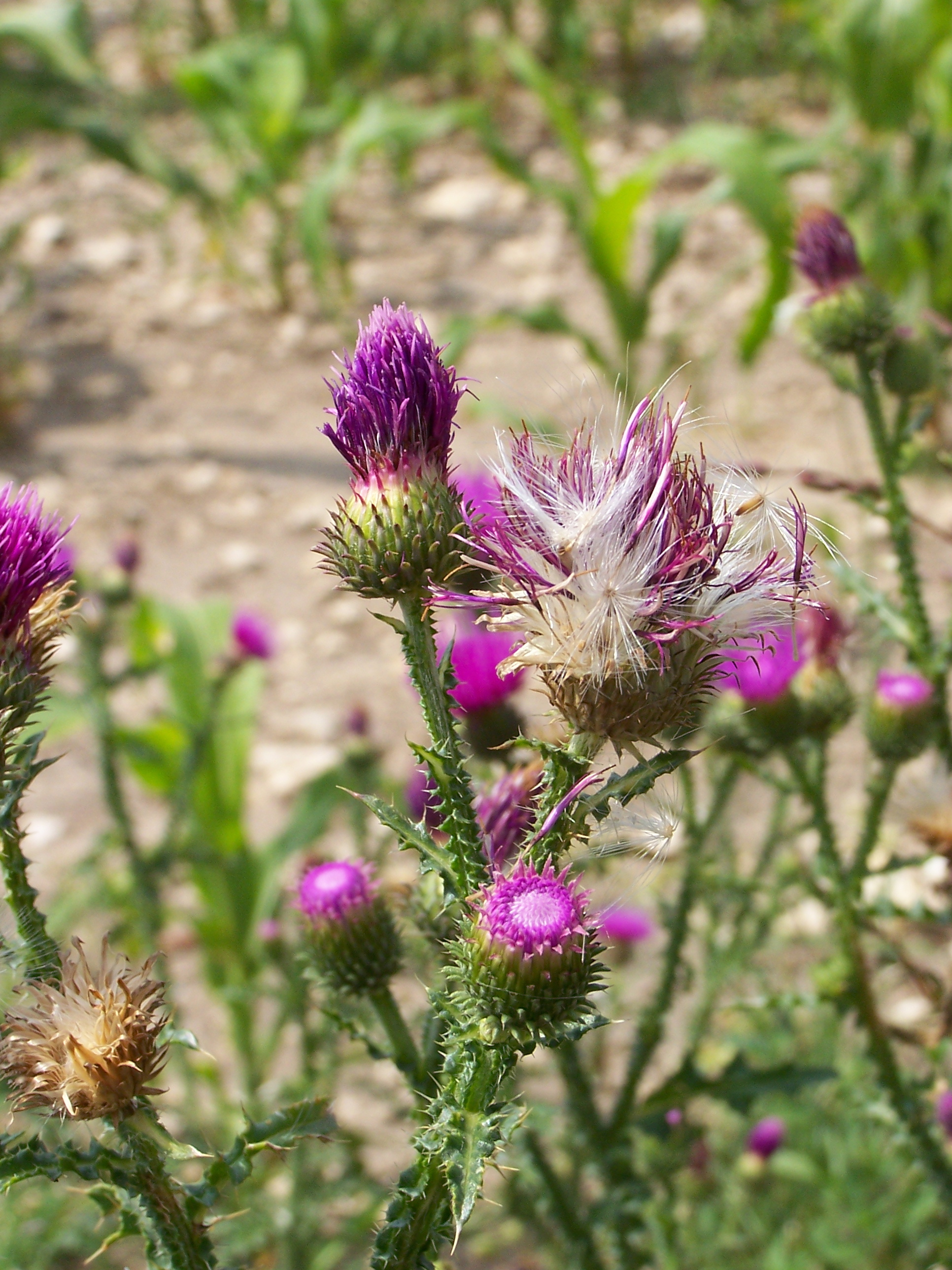 Carduus crispus.